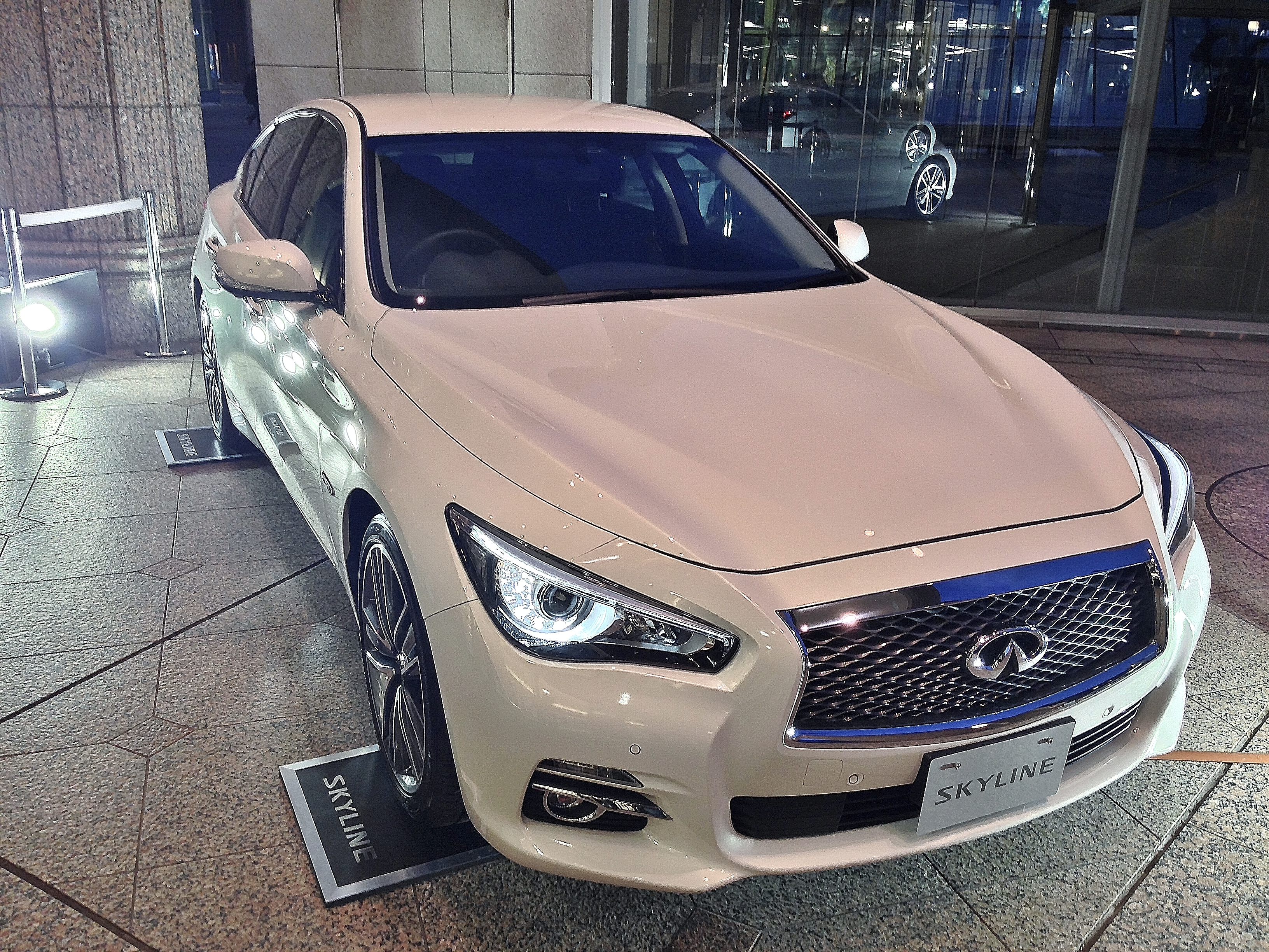 日産・DAA-HV37型スカイラインハイブリッドセダン 350GT Type SP/NISSAN SKYLINE HYBRID SEDAN 350GT Type SP(INFINITY Q50)